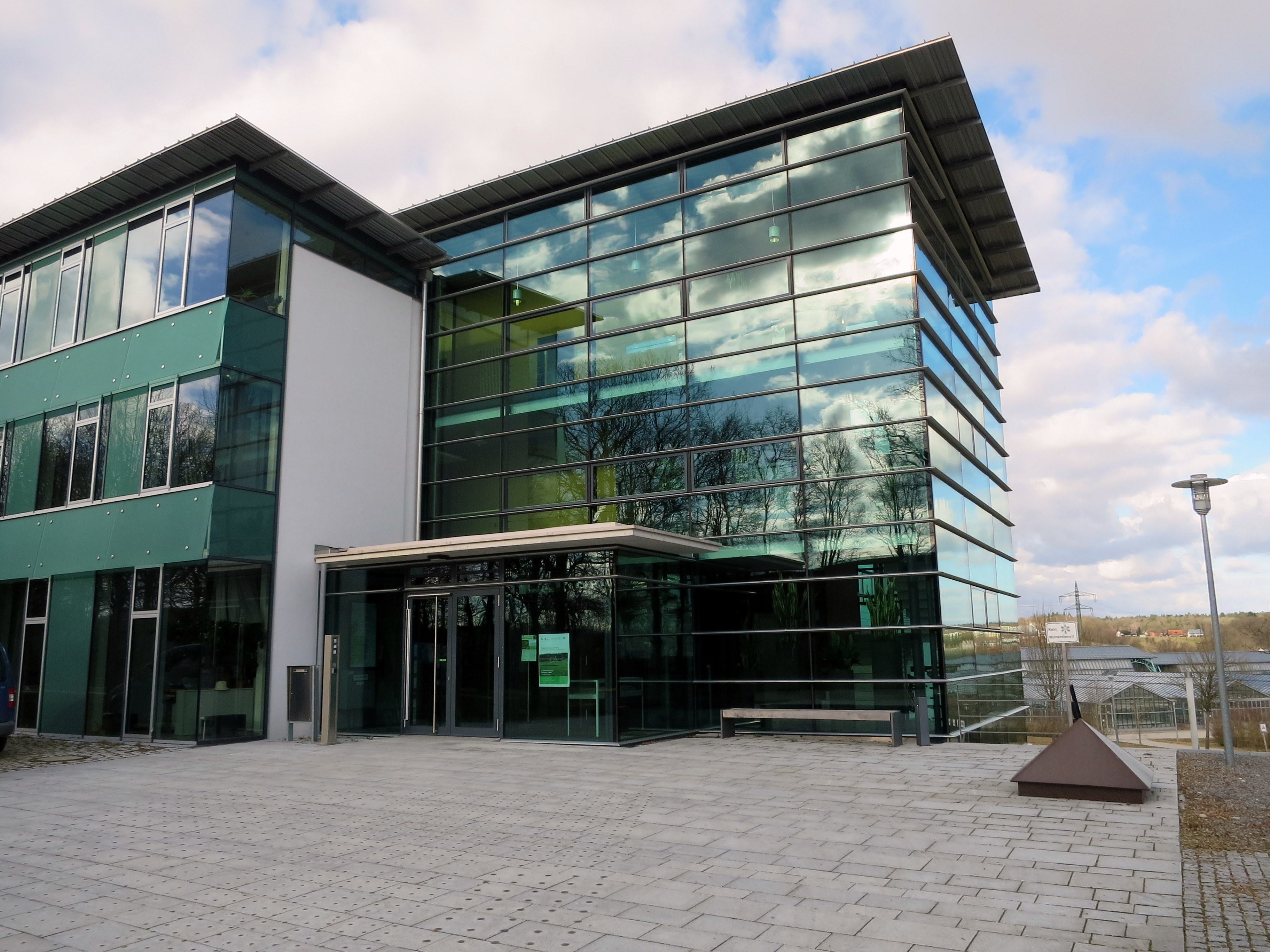 Institut der LfL